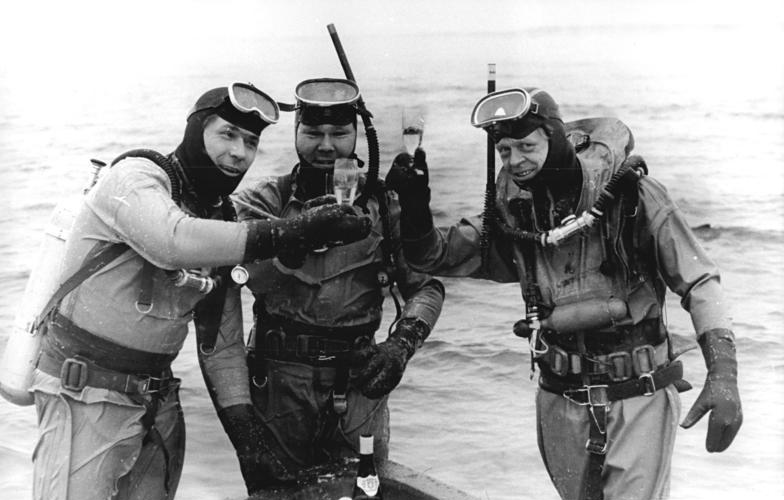 Neujahr, Sporttaucher beim Anstoßen ADN-ZB Müller-30.12.78 Bez. Frankfurt-Oder: Na dann, Prosit Neujahr! Nach gelungenem Silvestertauchen am 30.12. im Helenen-See beglückwünschen sich die GST-Sportler zur erfolgreichen Saison.